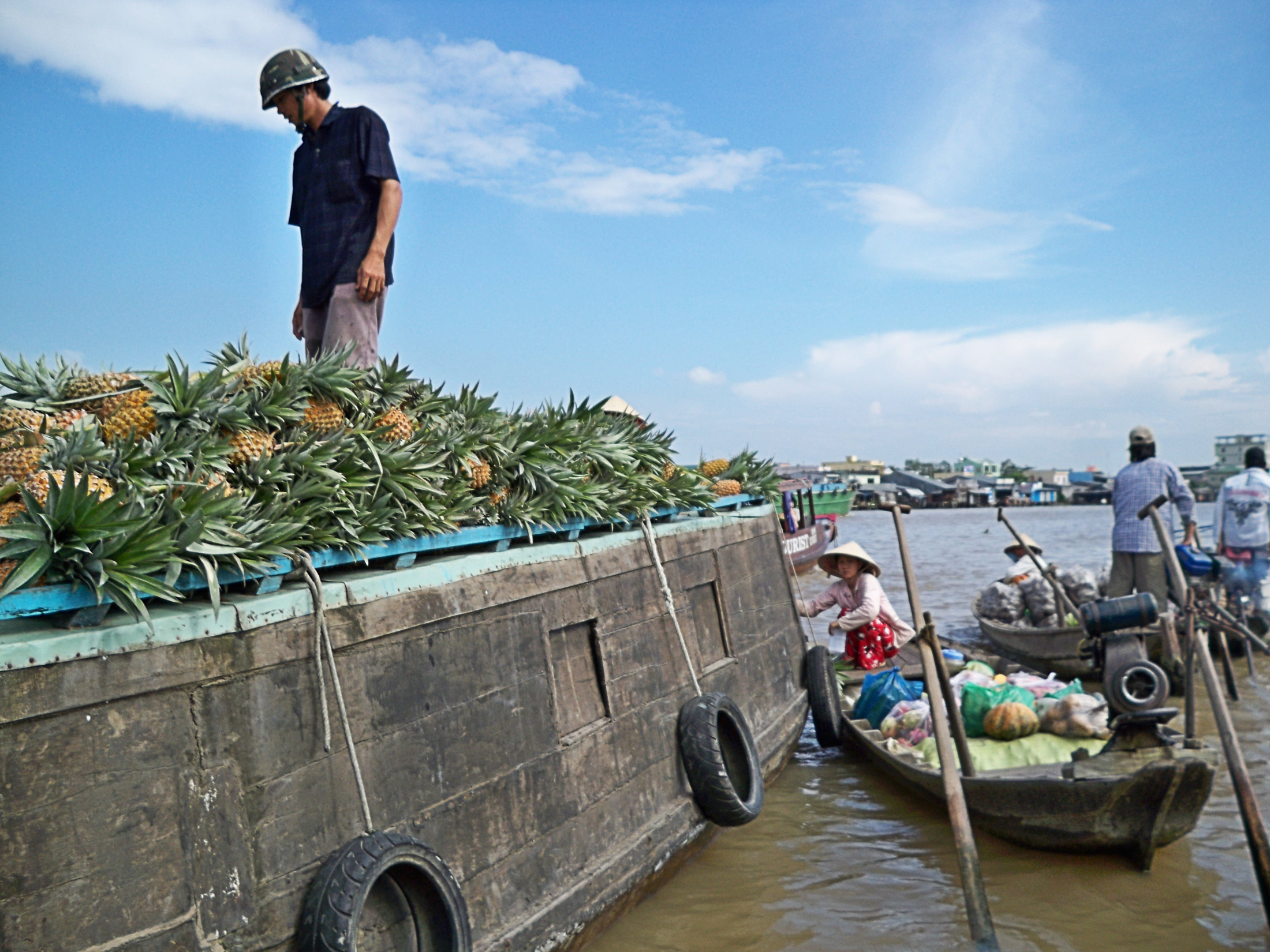 Floating Market